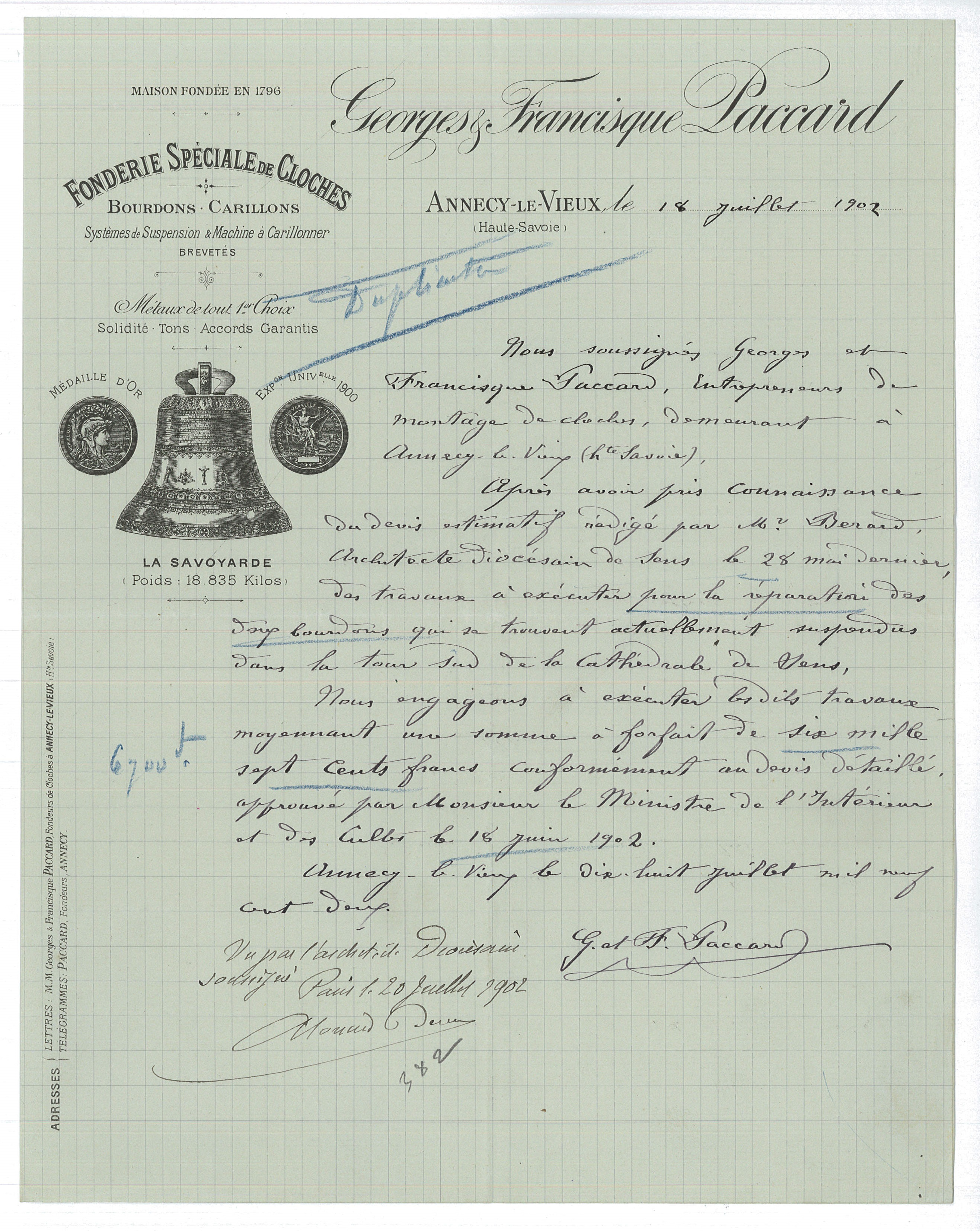 Soumission avec papier à entête de la fonderie de cloches Paccard pour la restauration des bourdons de la cathédrale de Sens. Archives nationales, cote F/19/7886.